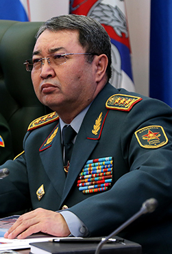 Первый заместитель Министра обороны Республики Казахстан – начальник Генерального штаба Вооруженных Сил Республики Казахстан генерал-полковник Сакен Жасузаков